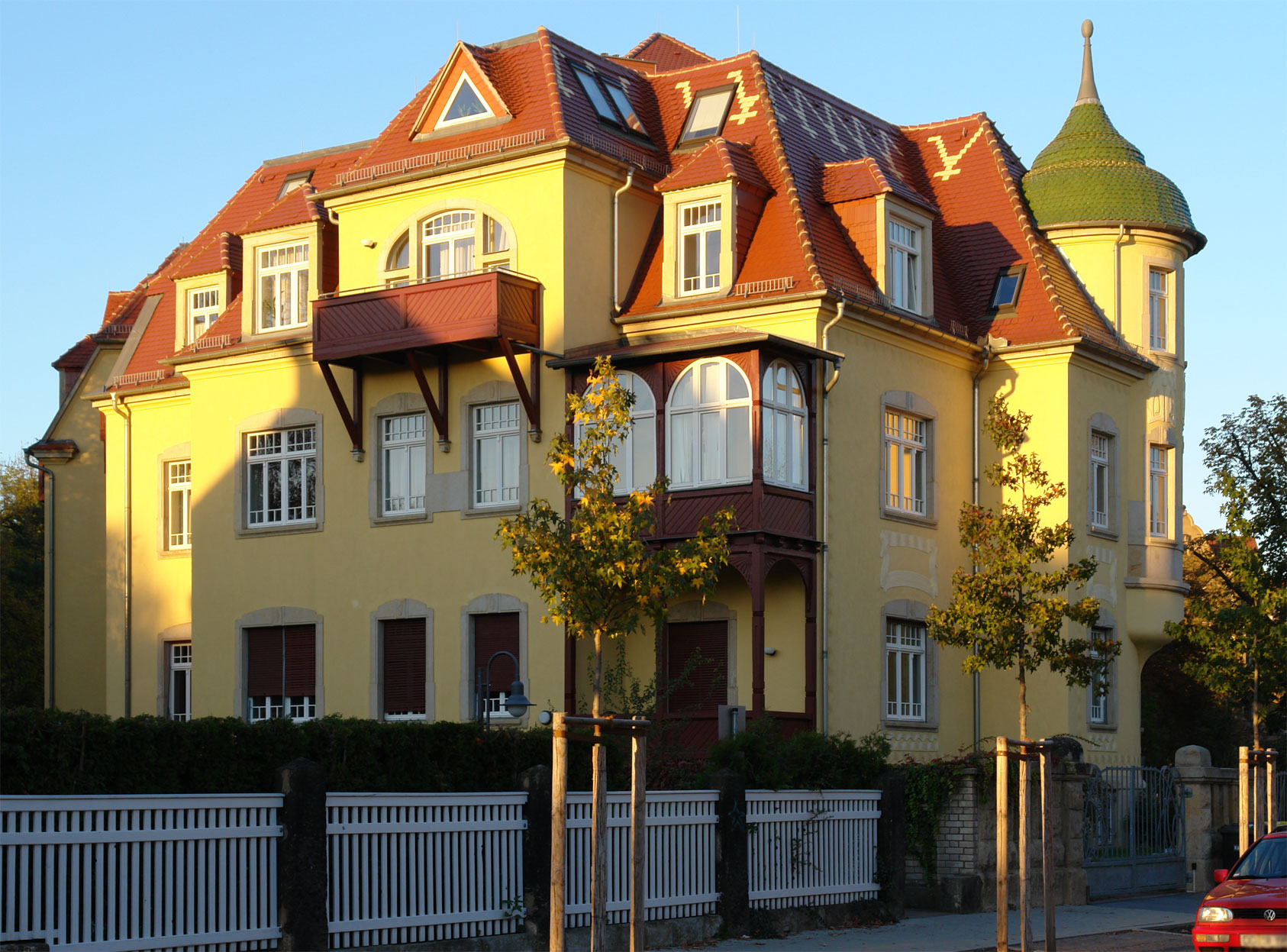 Walderseeschlösschen